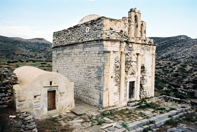 Titel: Heroón Locatie: Sikinos, Griekenland Datum: juni 2004 Fotograaf: Gebruiker:IMFJ